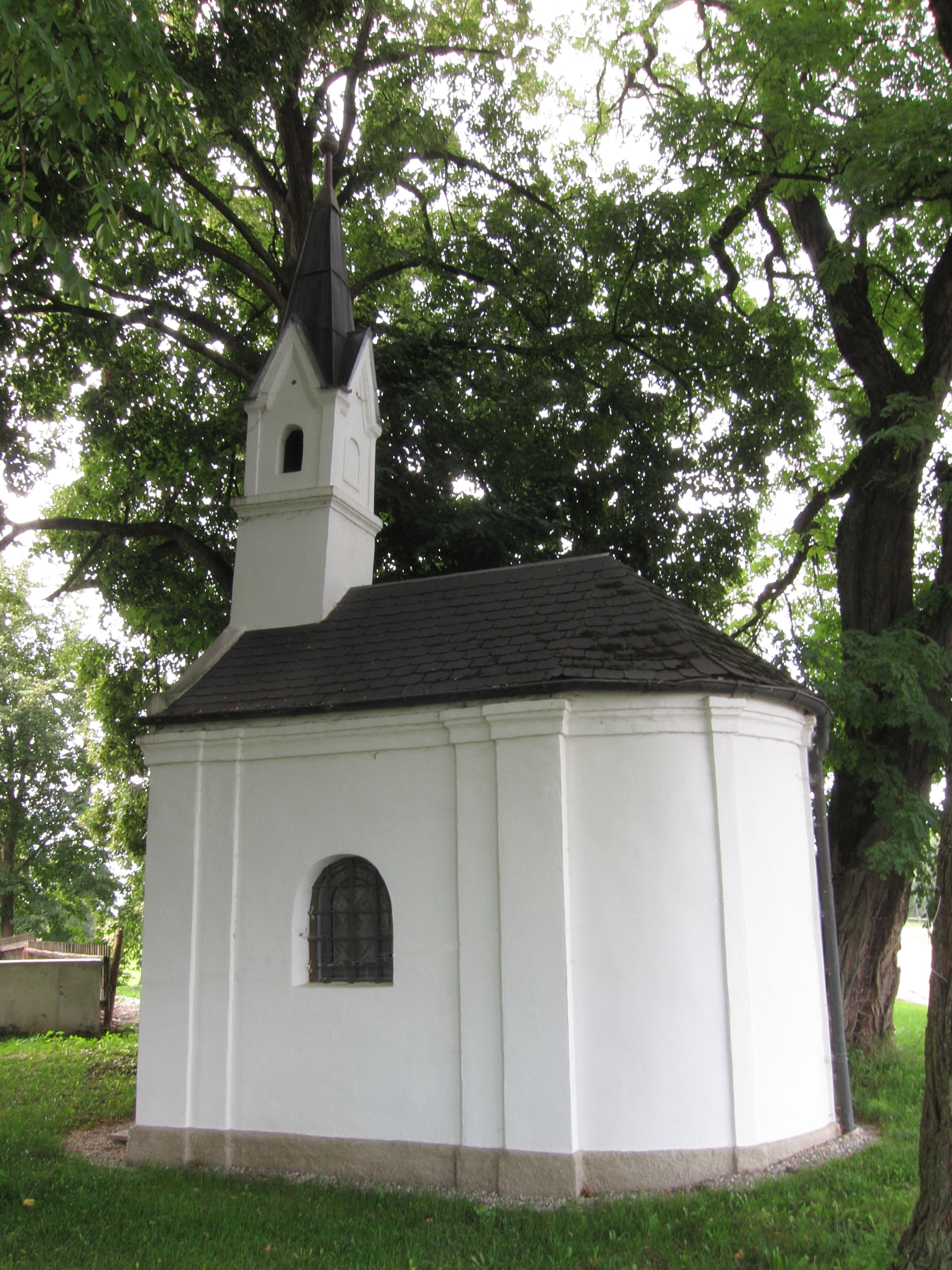 Singlding; Hofkapelle, massiver Satteldachbau mit Dachreiter in neugotischen Formen, um 1870/80.